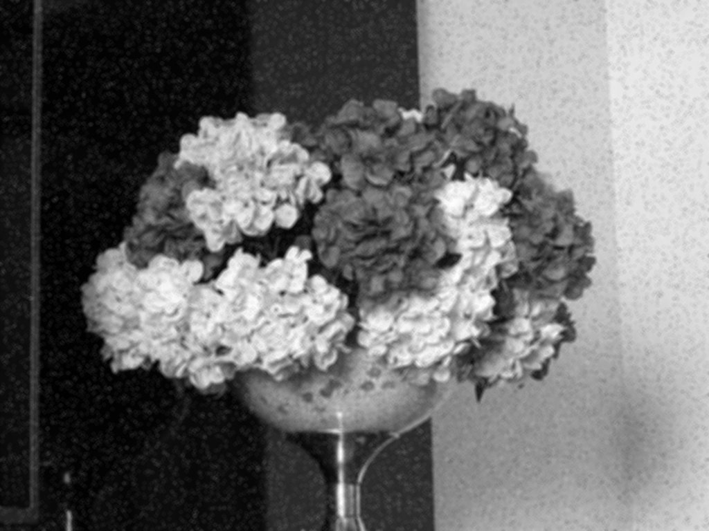 Imagem com máscara - tamanho 3 pixels